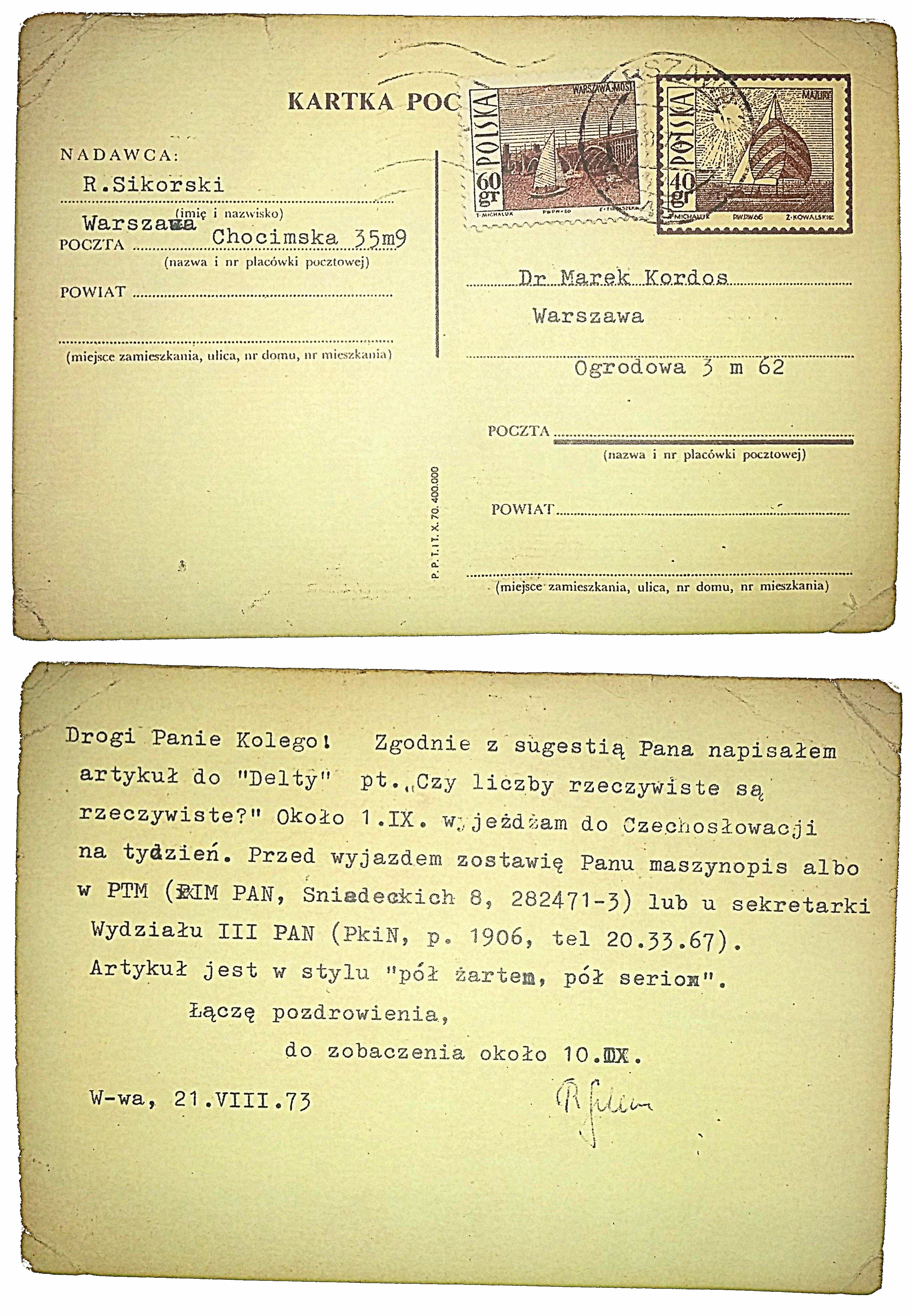 Jedno z pierwszych zamówień na artykuł do "Delty" z 1973 roku